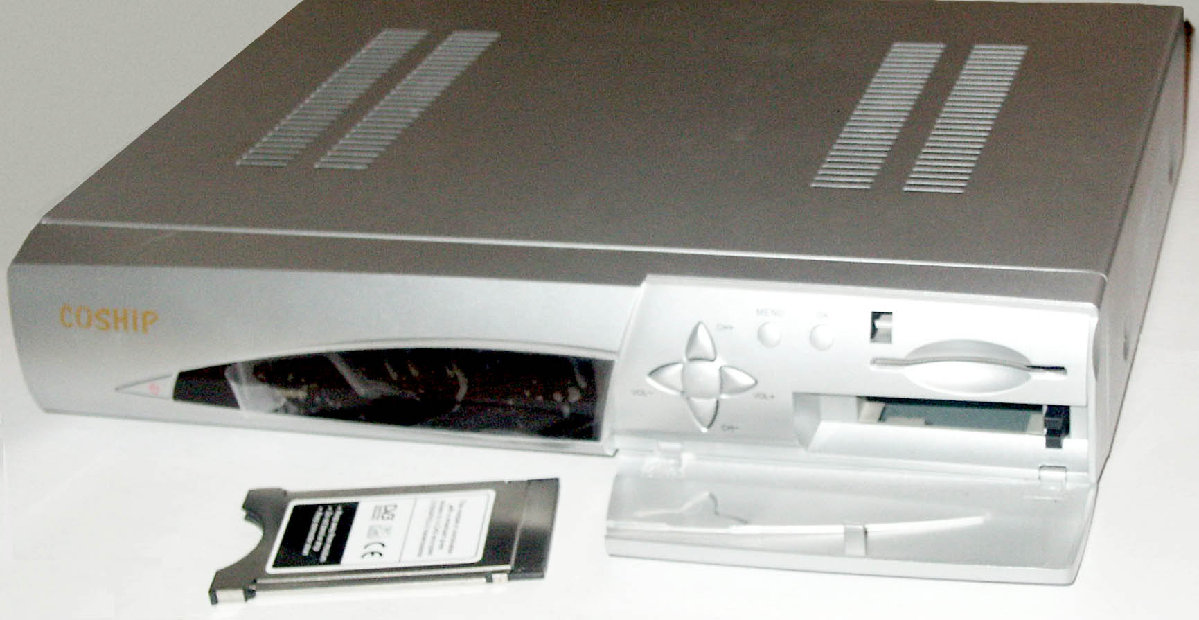 Récepteur DVB satellite receiver - common interface commune